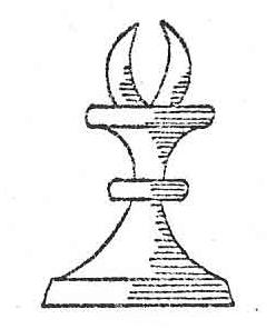 Darstellung der Alfil-Figur (15. Jahrhundert)